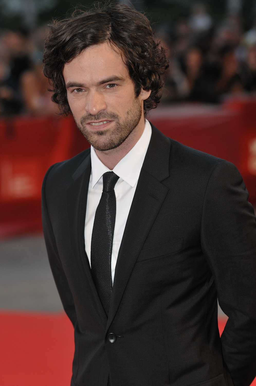 66ème Festival du Cinéma de Venise (Mostra), 4ème jour (05/09/2009) Tapis Rouge avec Romain Duris pour le film : Persécution